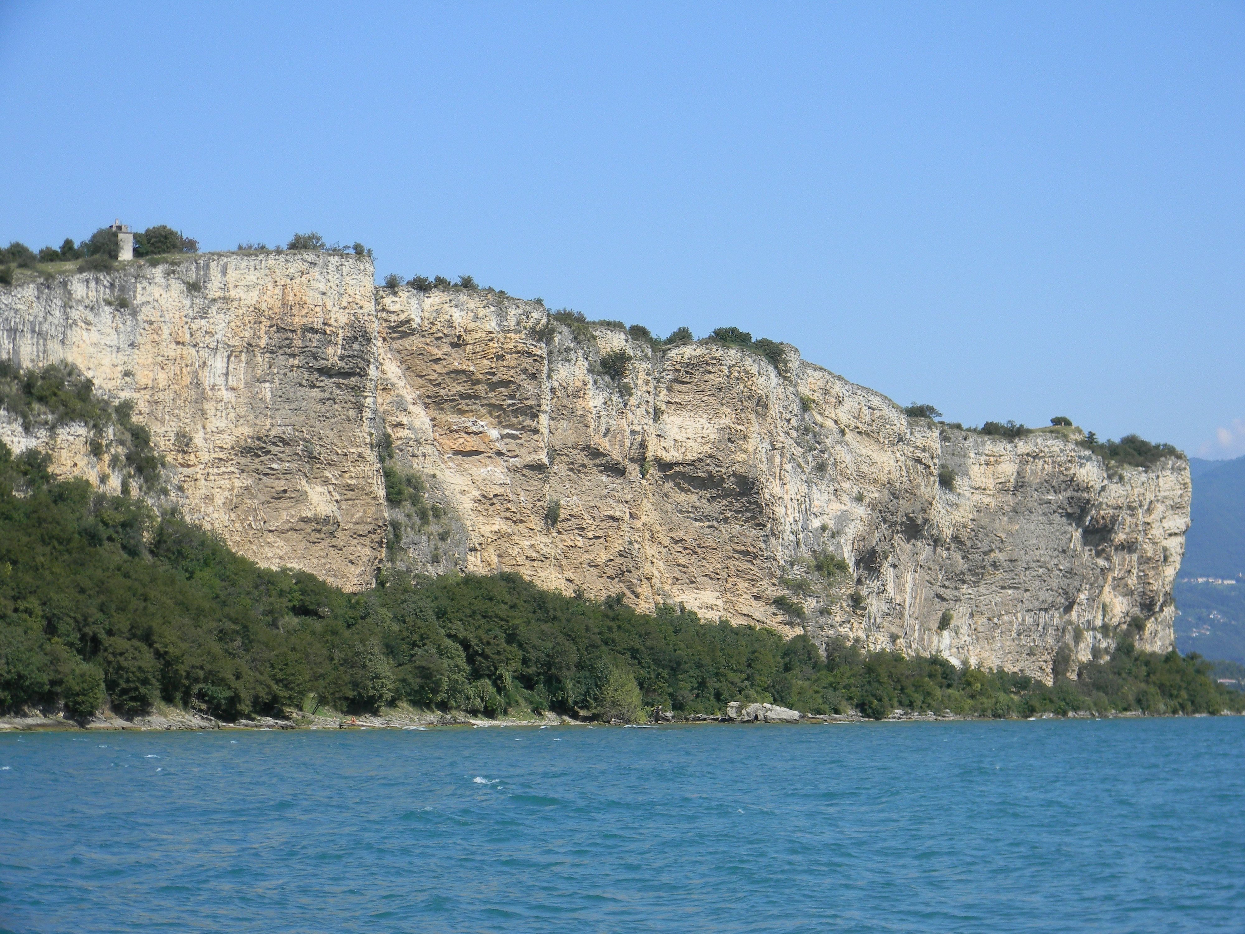 Falaise de Manerba del Garda, Lac de Garde, Italie.